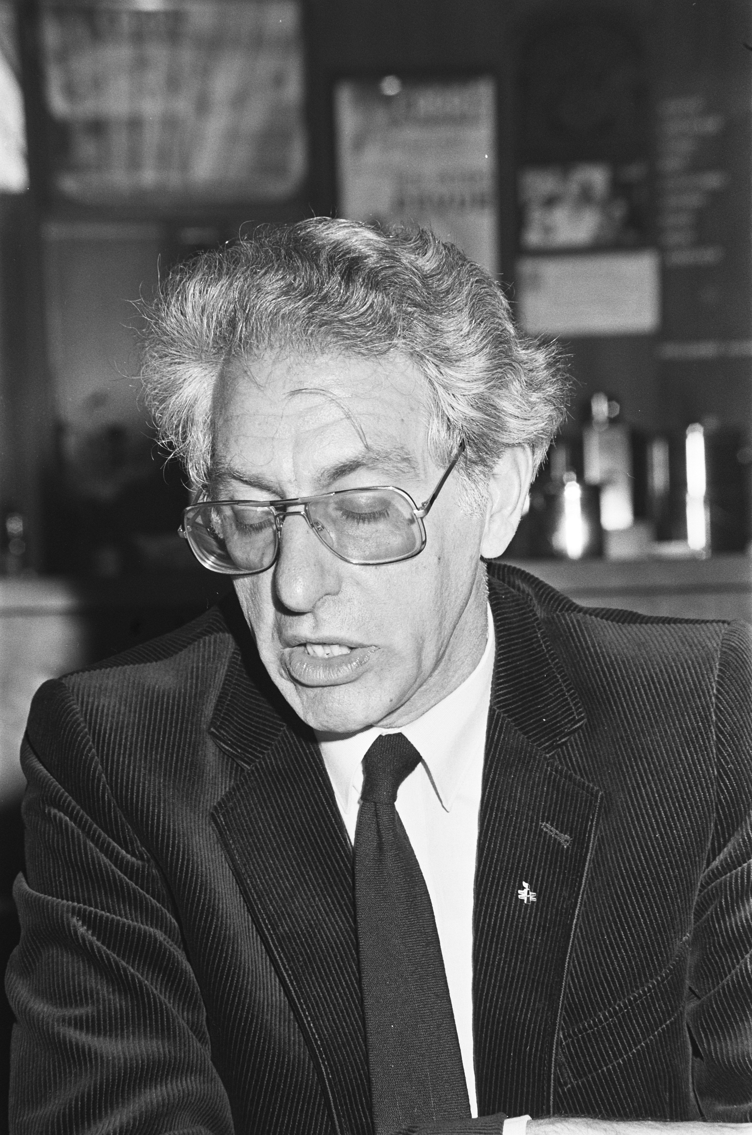 Collectie / Archief : Fotocollectie Anefo Reportage / Serie : [ onbekend ] Beschrijving : Persconferentie in verband met Amnesty International congres in Noordwijk in Carre. Peter Baehr (voorzitter conferentie) / Datum : 2 mei 1982 Locatie : Noordwijk Trefwoorden : congressen, persconferenties, voorzitters Persoonsnaam : Amnesty International Instellingsnaam : Carré Fotograaf : Dijk, Hans van / Anefo Auteursrechthebbende : Nationaal Archief Materiaalsoort : Negatief (zwart/wit) Nummer archiefinventaris : bekijk toegang 2.24.01.05 Bestanddeelnummer : 932-1353